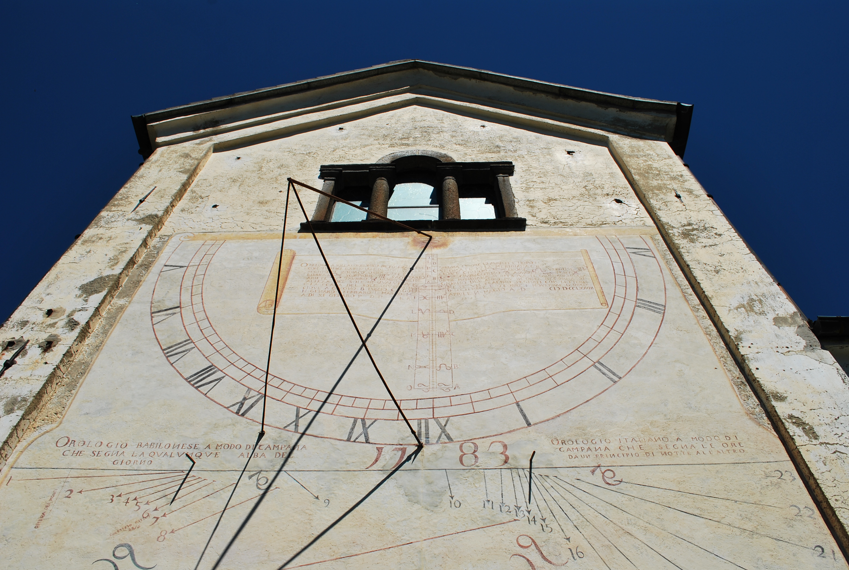 Meridiana monumentale, chiesa di San Martino (Campagnano, Maccagno con Pino e Veddasca VA)